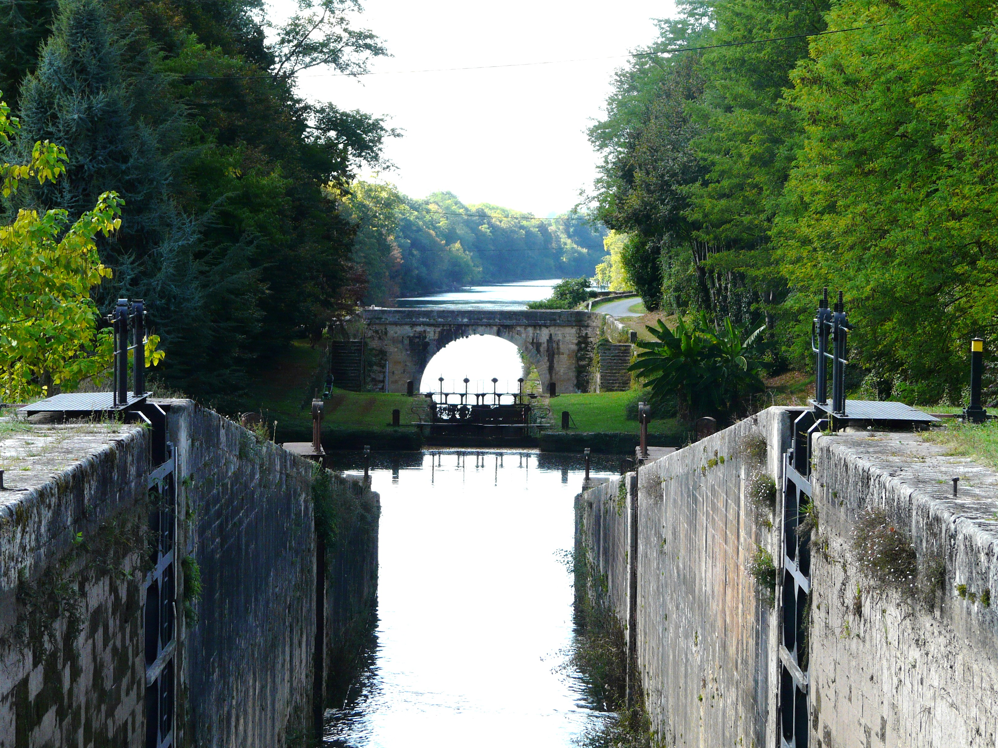 Le groupe d'écluses de Tuilières sur le canal de Lalinde, Mouleydier, Dordogne, France. La ligne d'arbres au-delà de la Dordogne se trouve sur la commune de Saint-Agne.